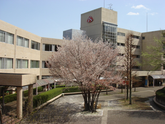 東京家政学院大学町田校舎 Tokyo Kasei Gakuin University School house. 2007/04/05, Contributor taking a picture. Permission is granted to copy, distribute and/or modify this document under the terms of the GNU Free Documentation License, Version 1.2 or any later version published by the Free Software Foundation; with no Invariant Sections, no Front-Cover Texts, and no Back-Cover Texts. A copy of the license is included in the section entitled "GNU Free Documentation License".